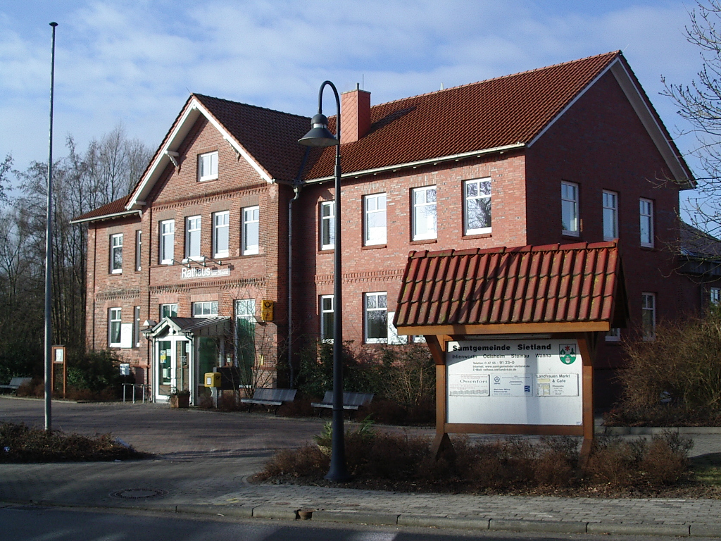 Photo taken by User:Geoz February 2006 Das Rathaus in Ihlienworth in der Alten Molkerei